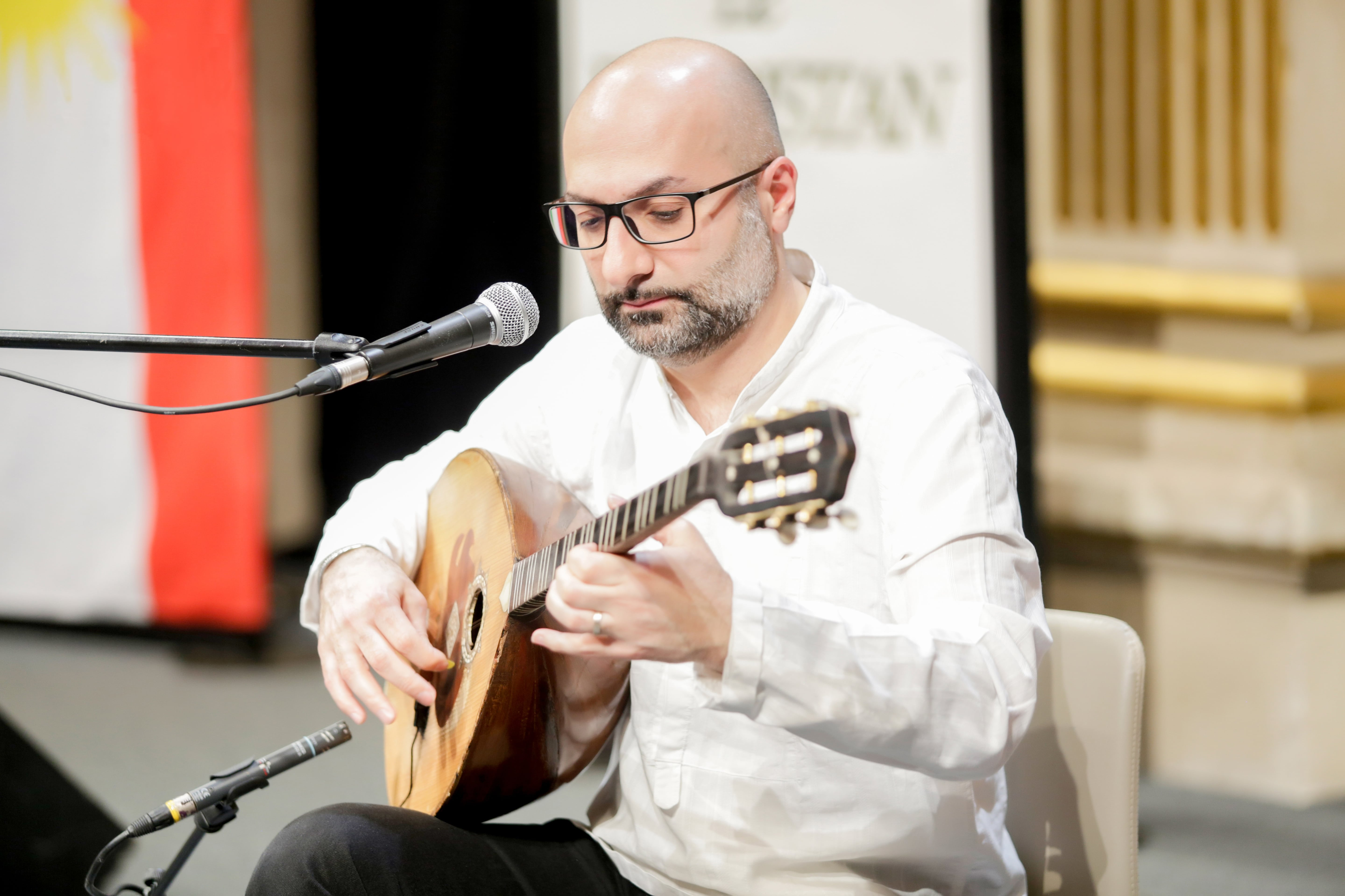 Artiste sur la scène lors la célébration du nouvel an kurde.